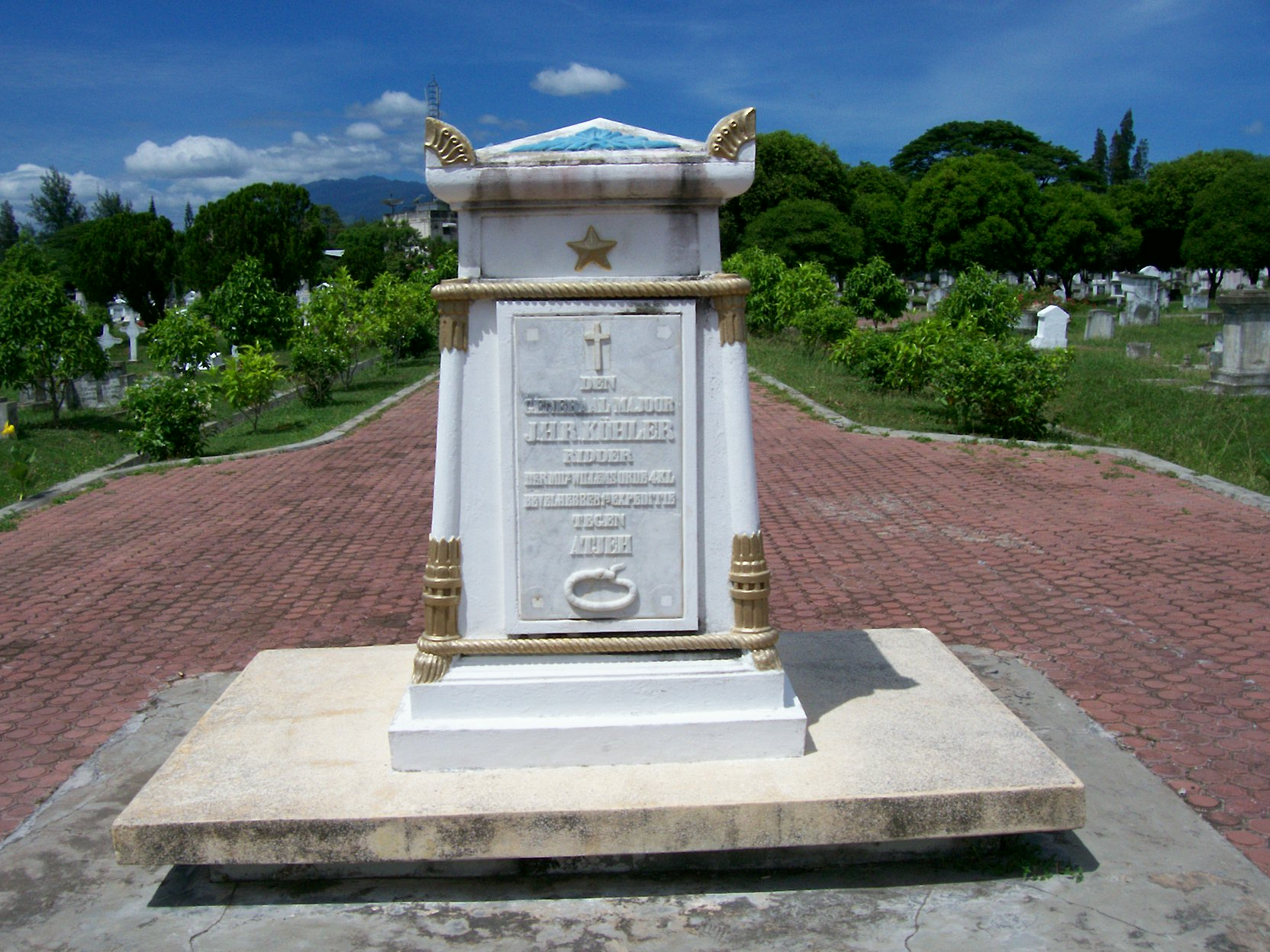 Makam Jenderal J.H.R. Kohler di Peucut, Banda Aceh